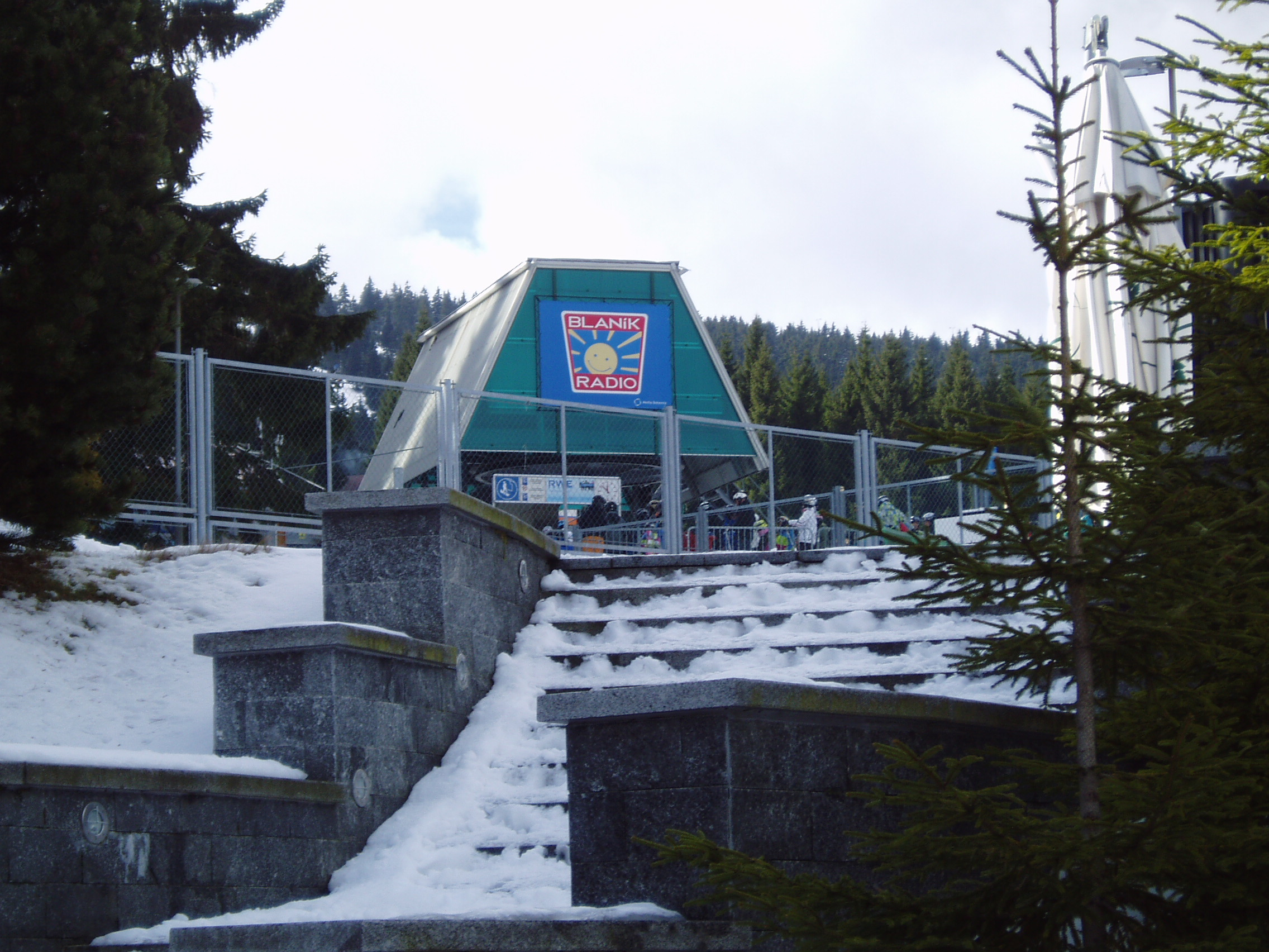 Lanová dráha Dámská